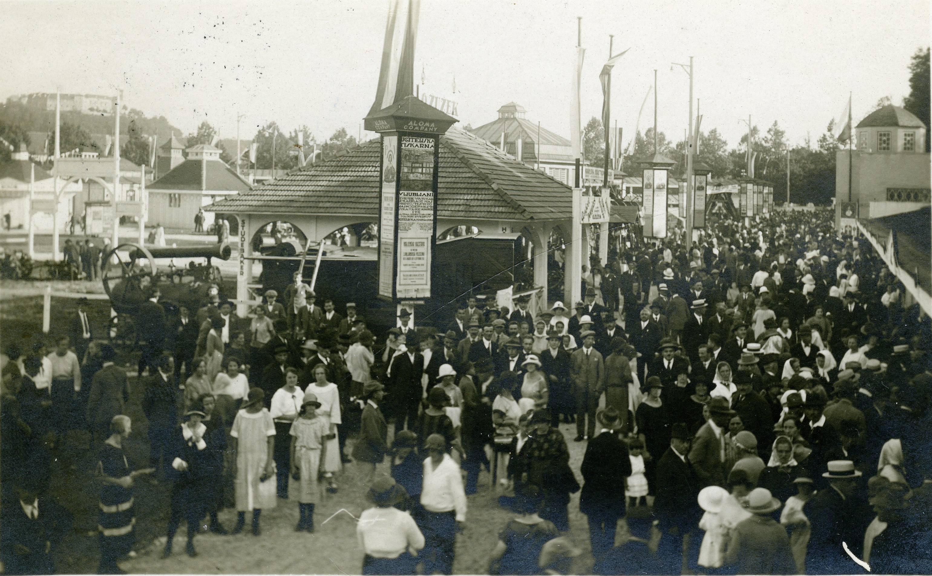 Razglednica Ljubljanskega velesejma.